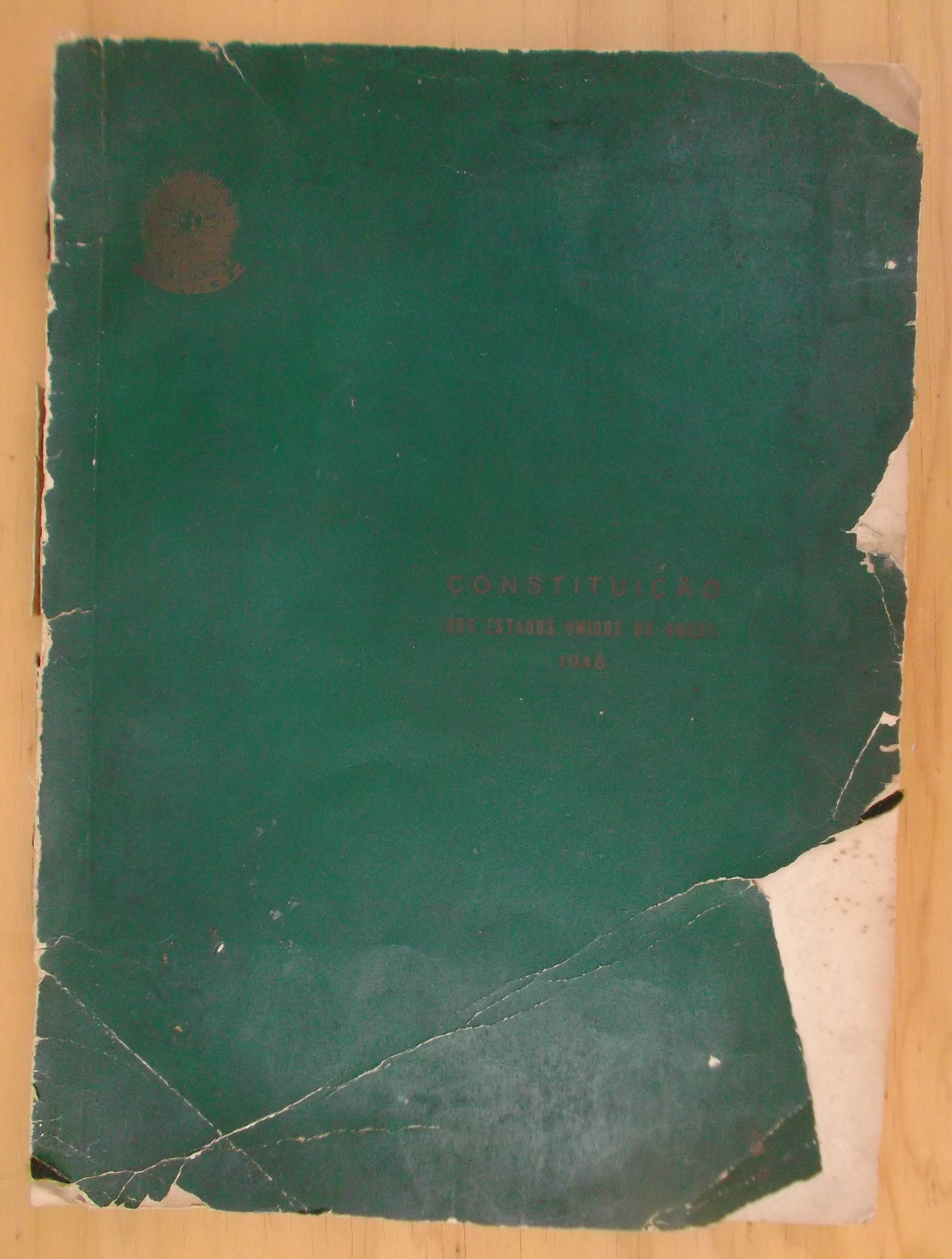 Raro exemplar do texto da Constituição do Brasil de 1946(oficialmente: Constituição dos Estados Unidos do Brasil). Esse exemplar tem a reprodução das assinaturas de todos(as) os deputados e senadores constituintes. Tem as seguintes medidas: 27 cm de largura, 37 cm de comprimento e 1cm de altura.